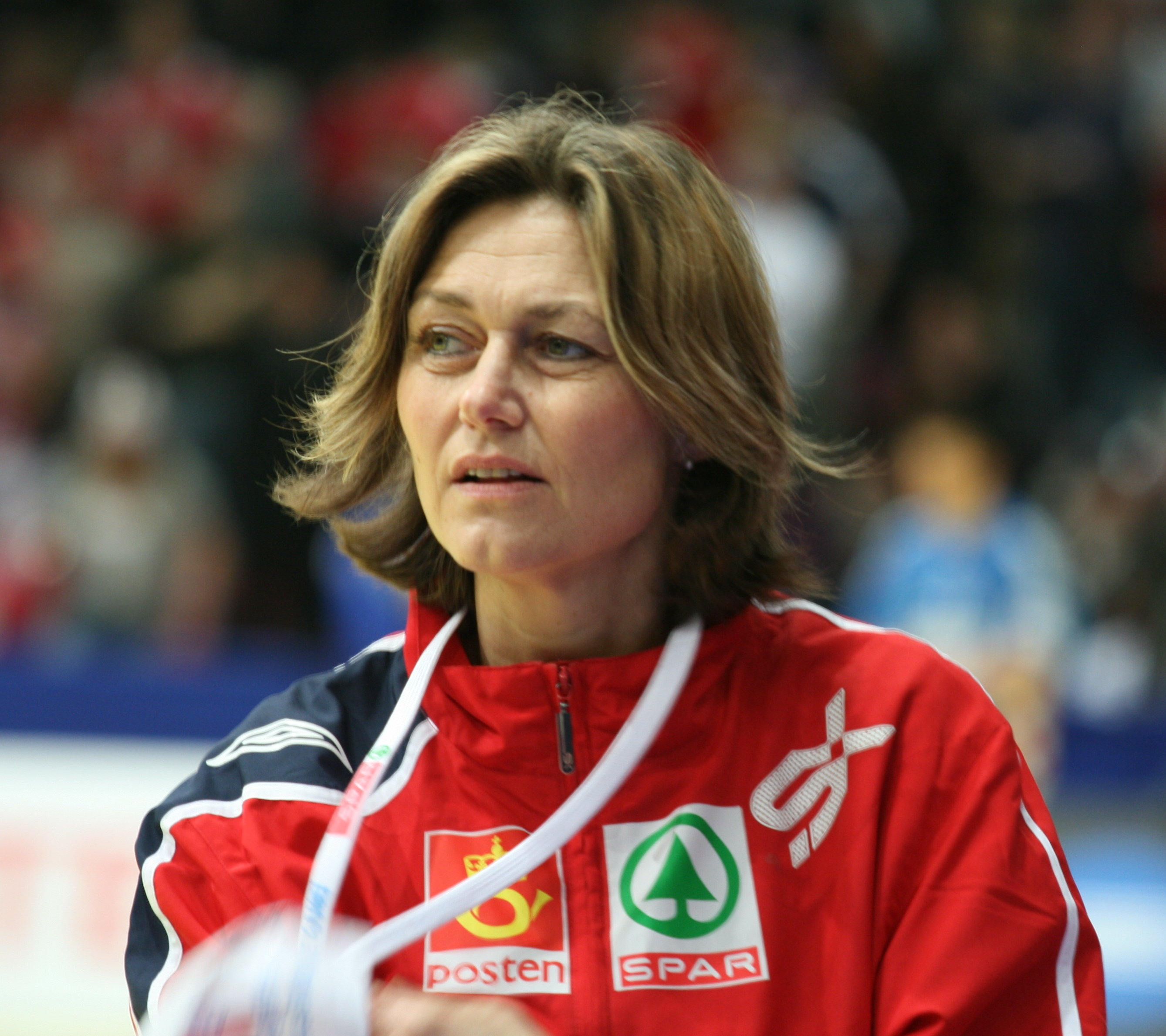 Hanne Hegh, Norwegian handballer, in Stavanger